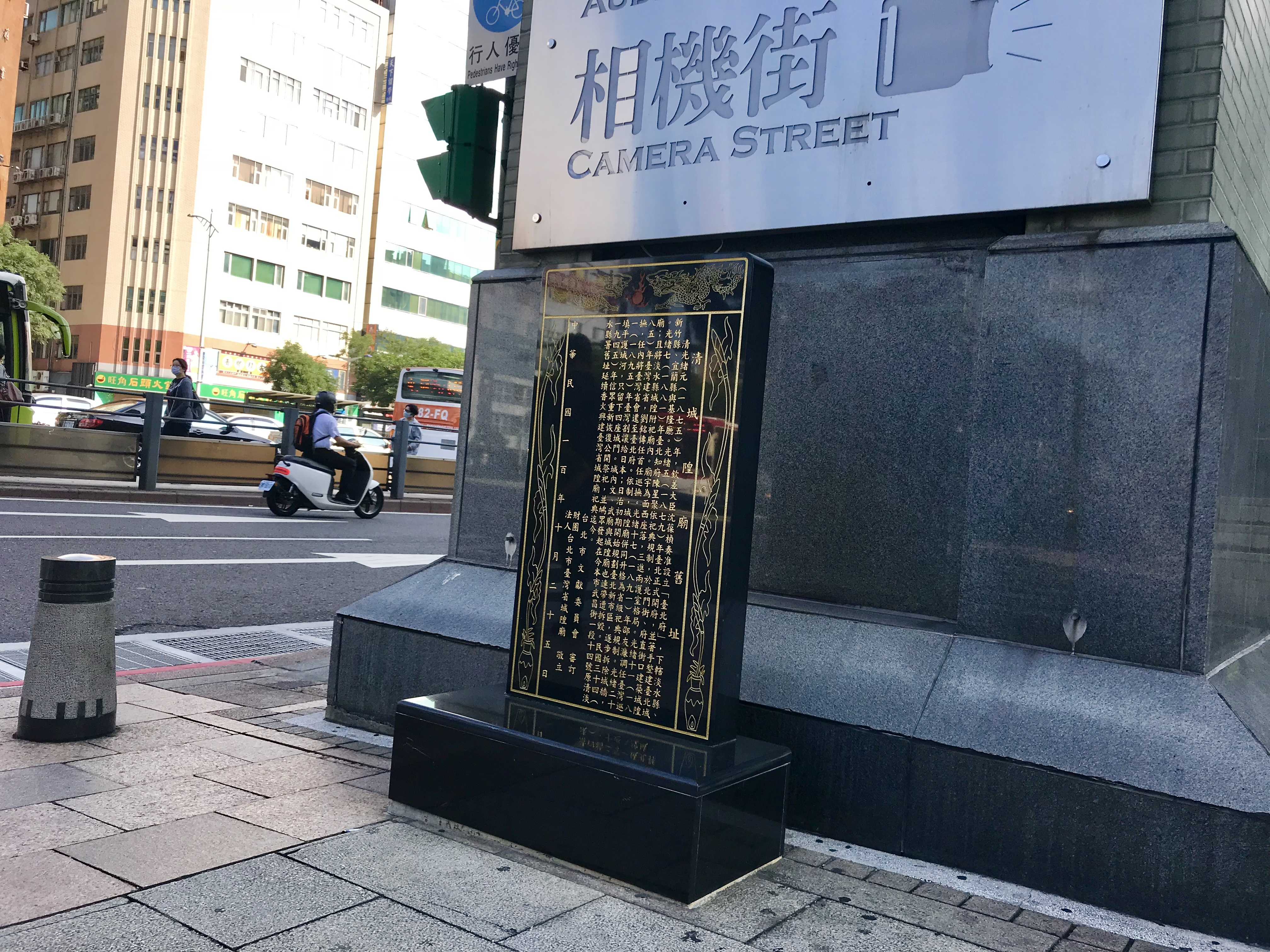 中文（台灣）: 臺北市中正區中華路一段與漢口街一段口、台糖騰雲大樓前、台北捷運西門站通風井旁，清城隍廟舊址紀念碑，2011年10月25日臺灣省城隍廟立碑，臺北市文獻委員會審定碑文。